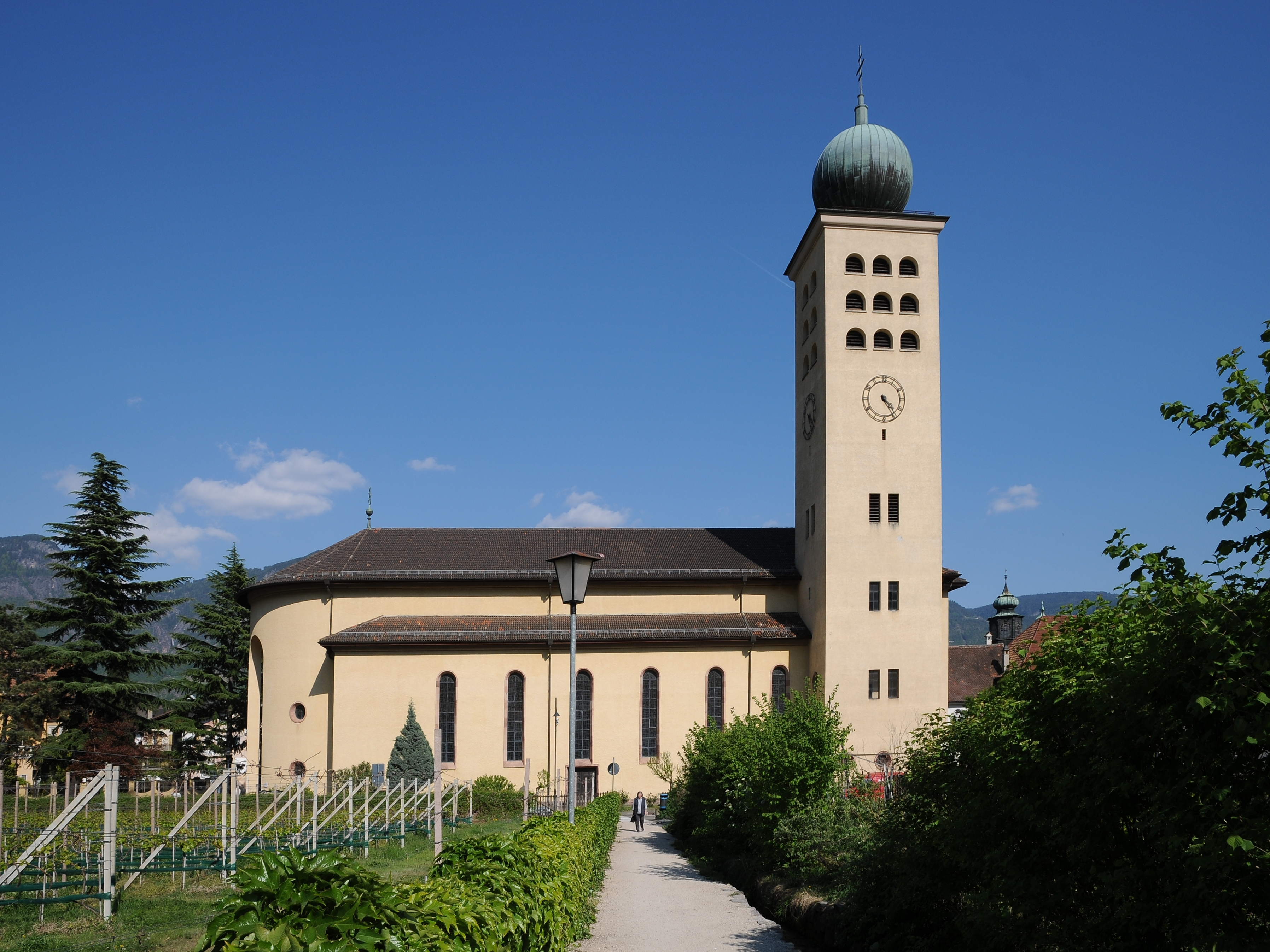 Die Pfarrkirche Hl.Kreuz in Lana wurde nach Plänen von Otto Linder in den Jahren 1938-43 erbaut und 1950 eingeweiht.